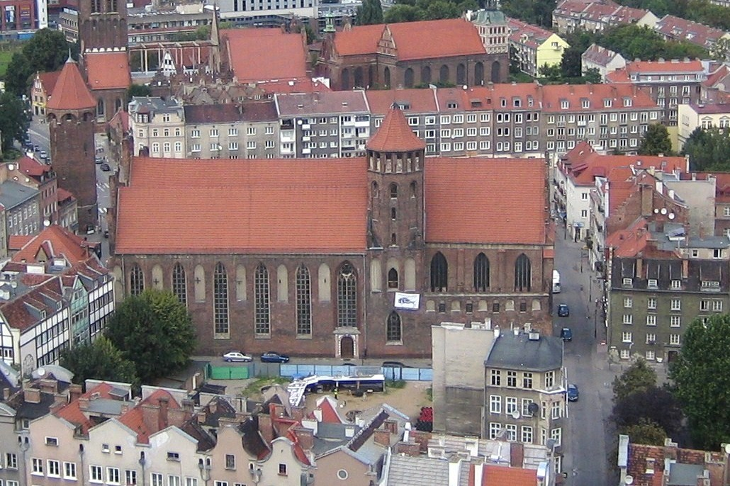 Gdańsk Główne Miasto, ul. Świętojańska 72 - kościół klasztorny dominikanów, obecnie rzymskokatolicki parafialny p.w. św. Mikołaja (Bazylika mniejsza), XIII, 2 poł. XIV, XV